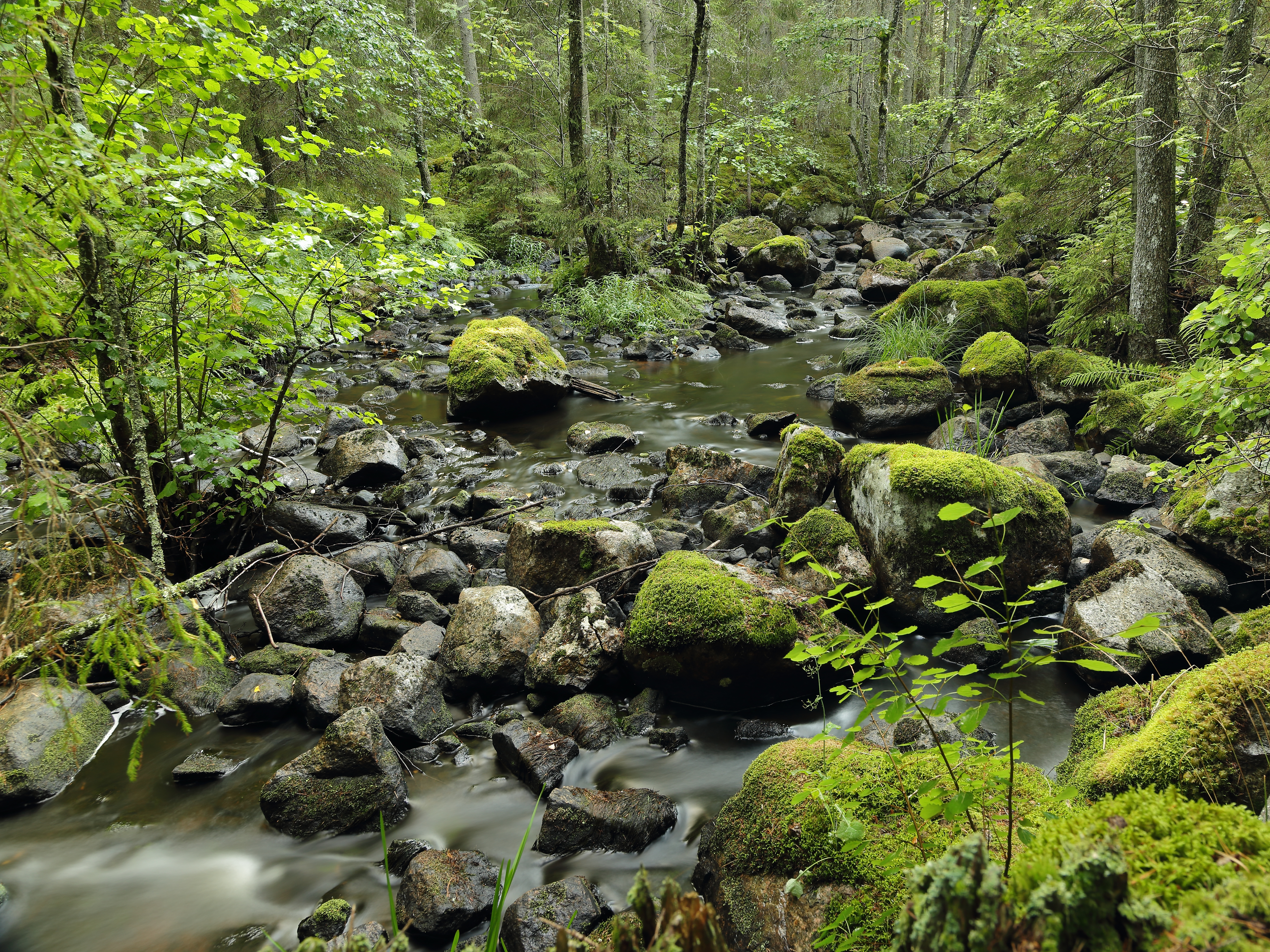 Venabäcken, ett naturreservat i Västmanlands län, Köpings kommun.